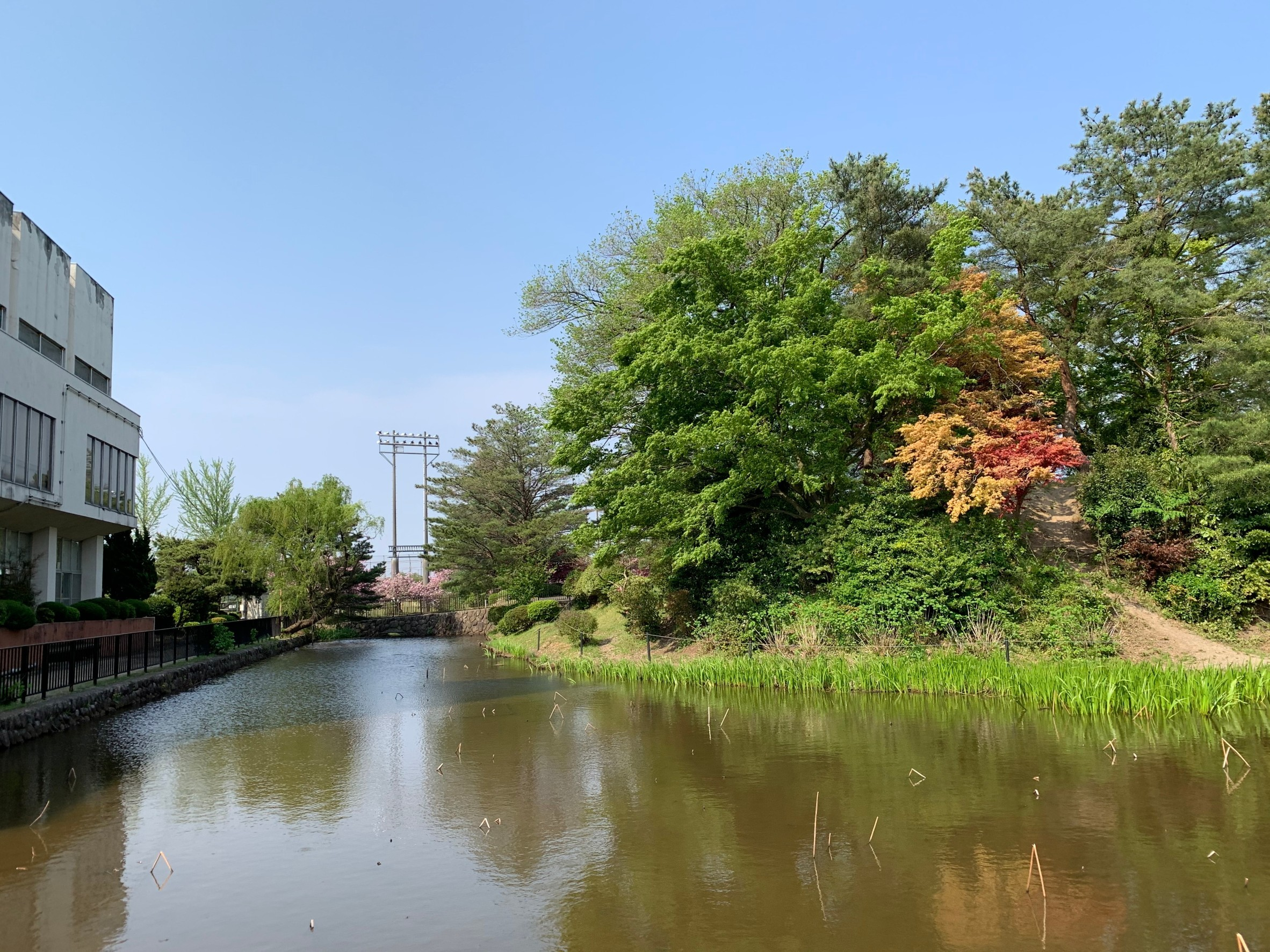 安田城跡。堀が残る（新潟県阿賀野市，2020年5月）